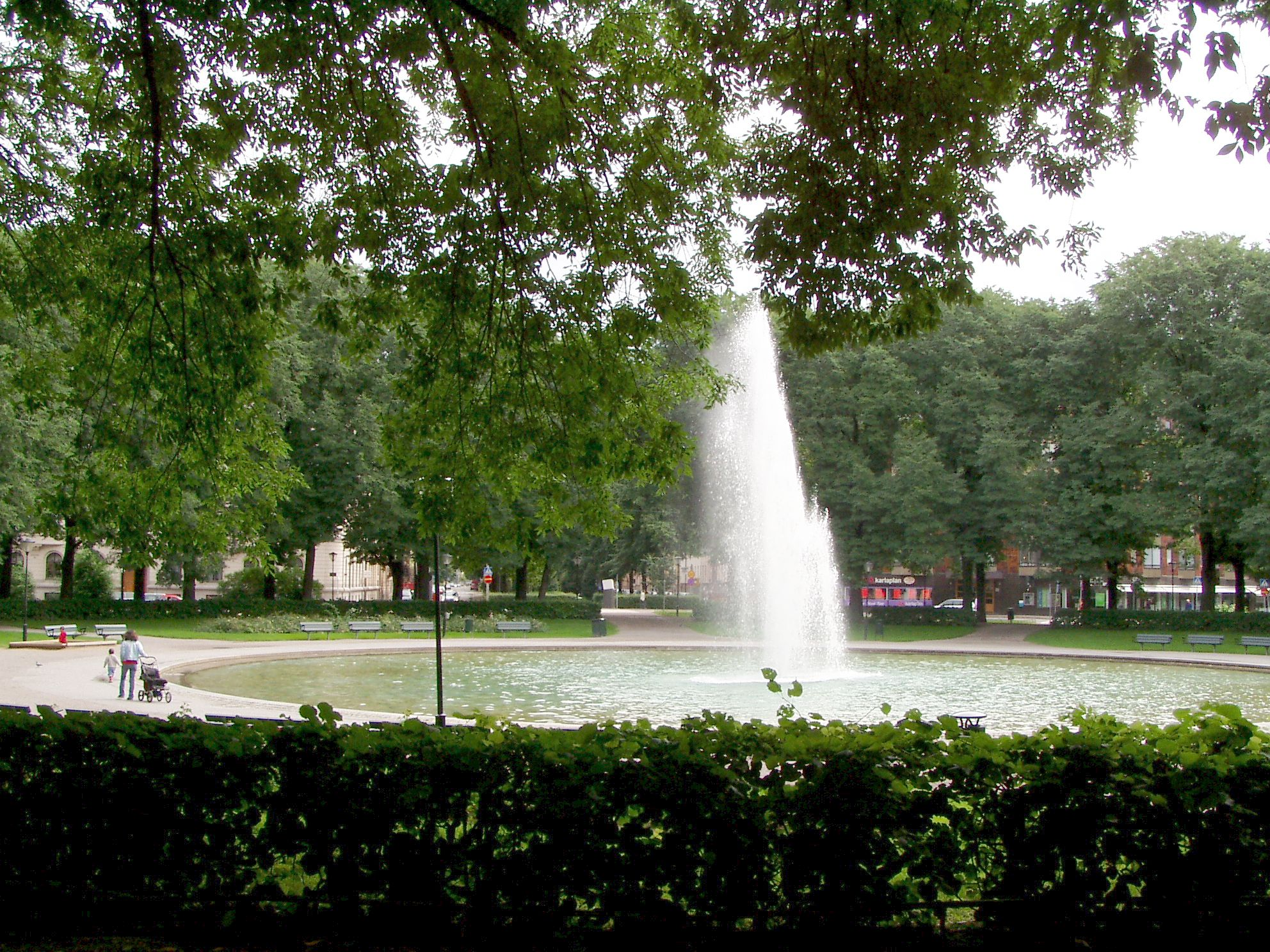 Karlaplan med fontänen mot Karlavägen och Narvavägen.